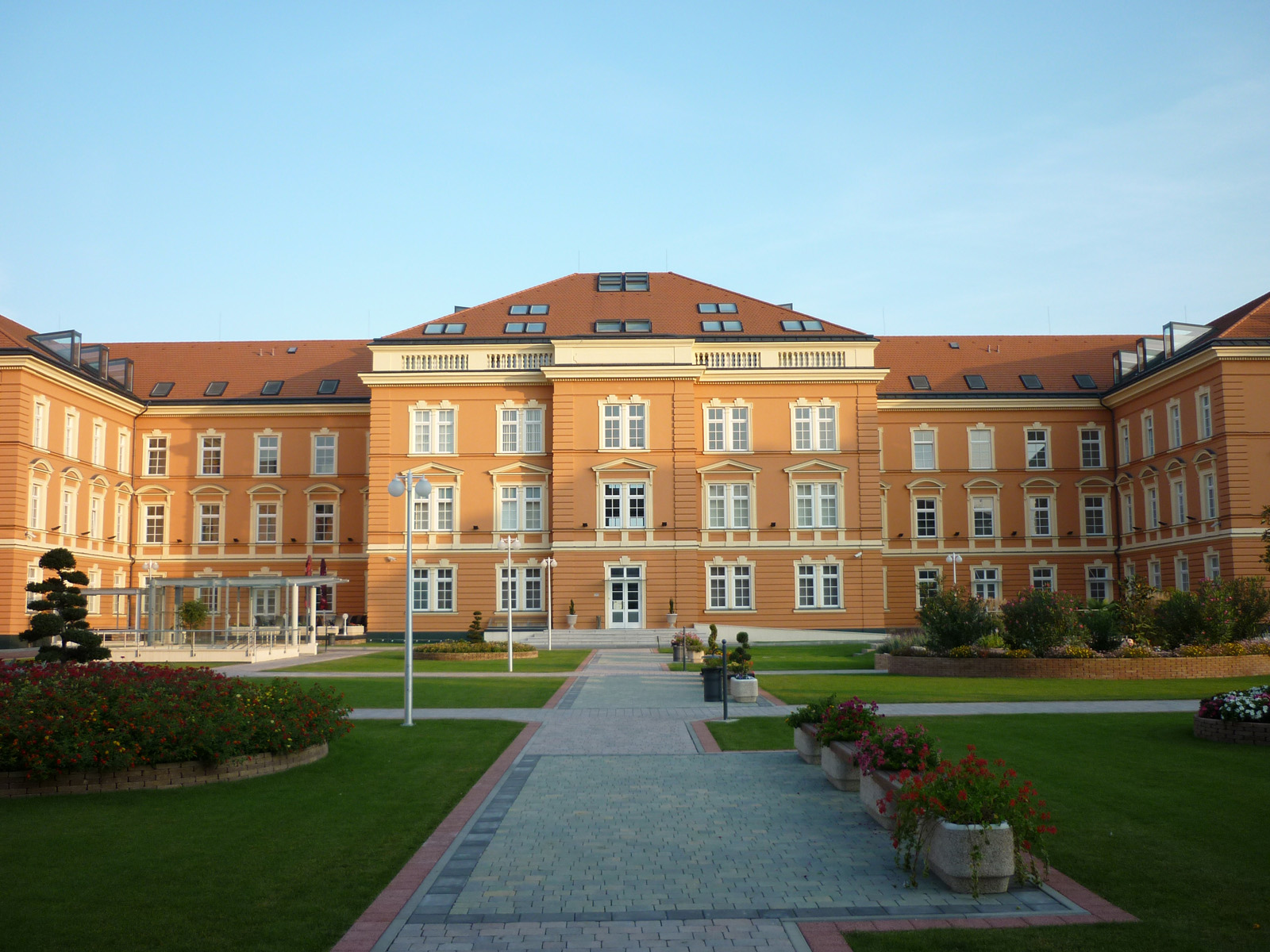 Frigyes laktanya legénységi épületek (Győr, Baross Gábor u. 42.) This is a photo of a monument in Hungary, Identifier: 16671